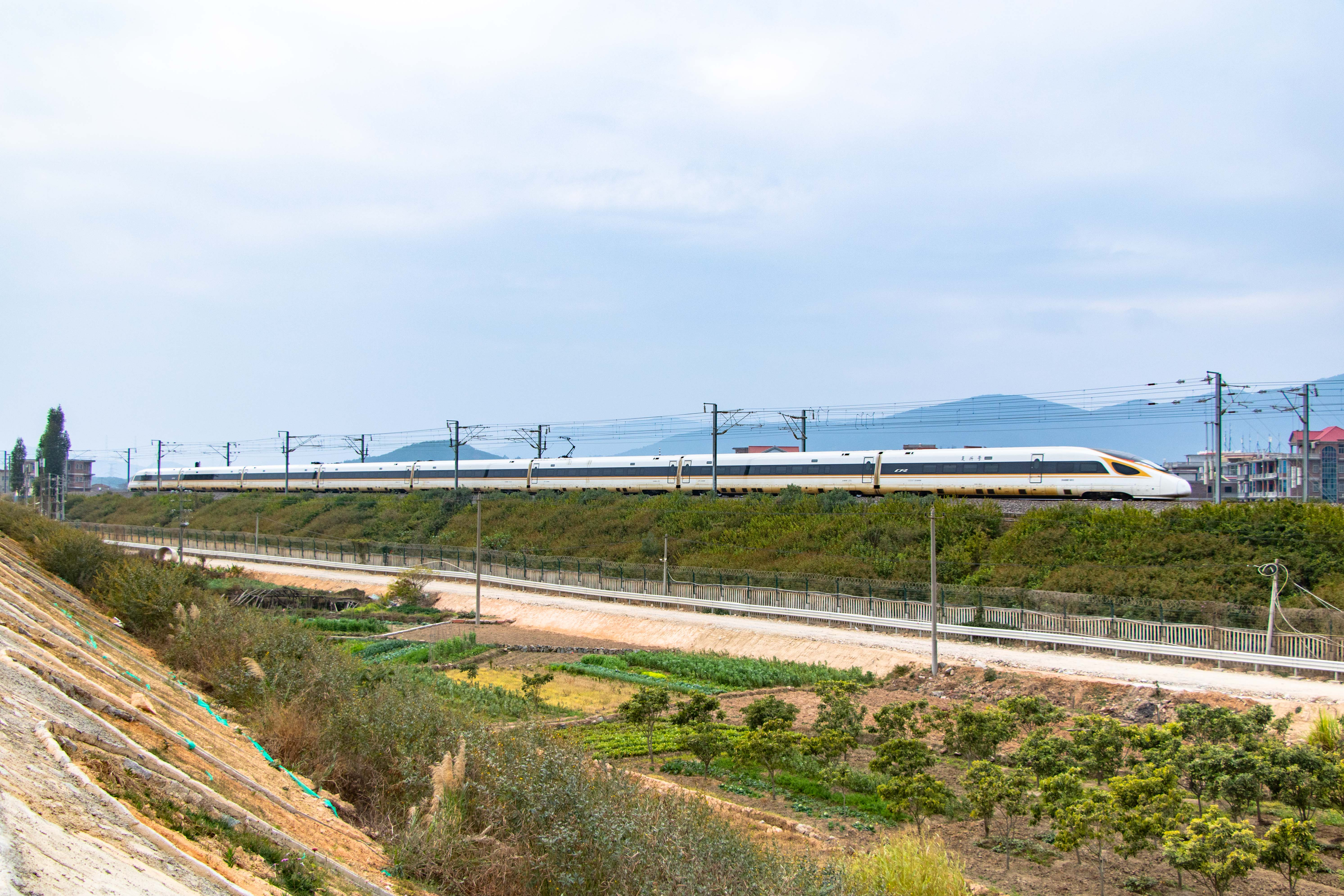 中文（中国大陆）: 行驶在福厦铁路上的复兴号CR400BF型电力动车组